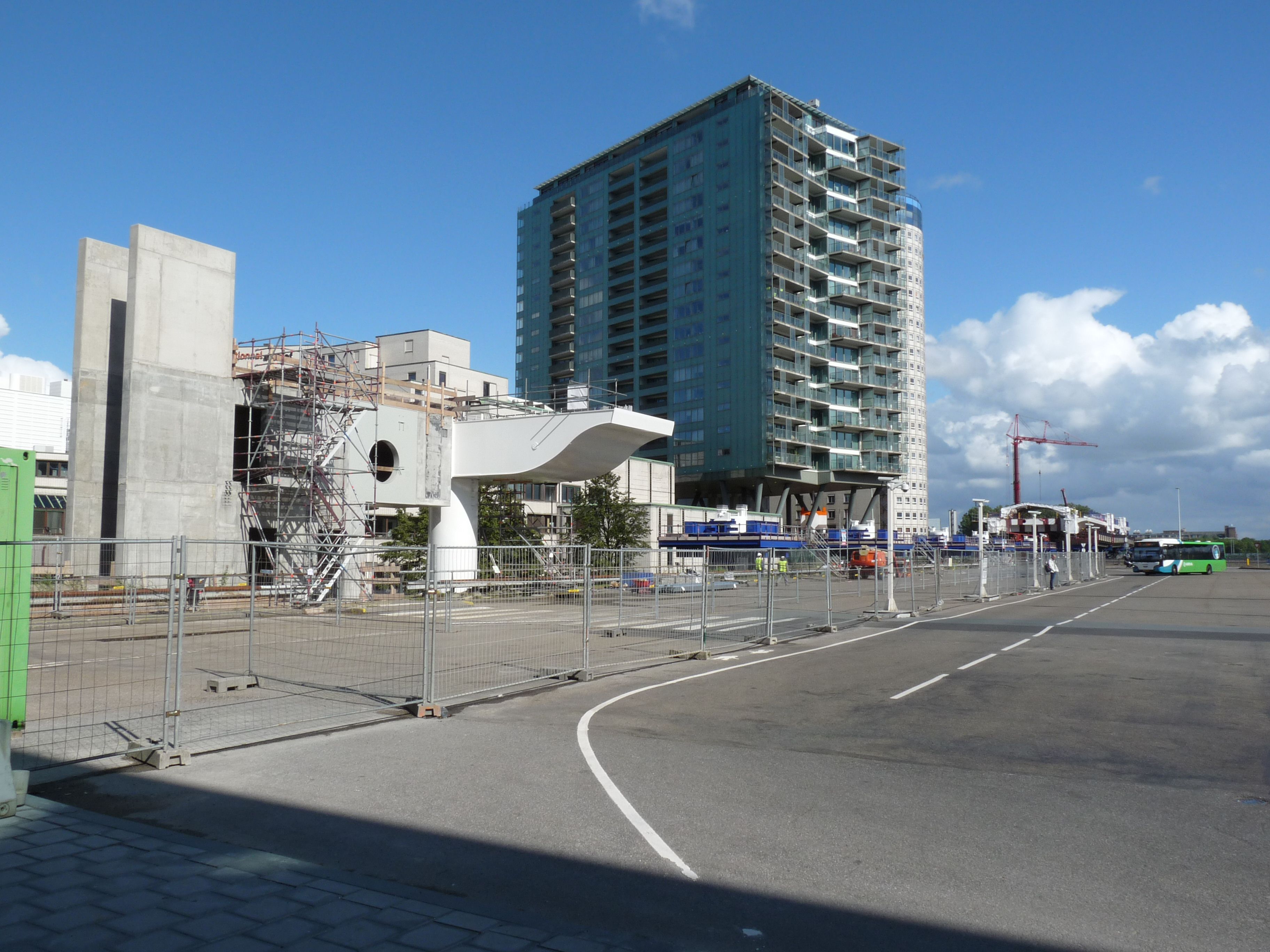 In aanbouw zijnde Erasmuslijnlanding bij Den Haag CS